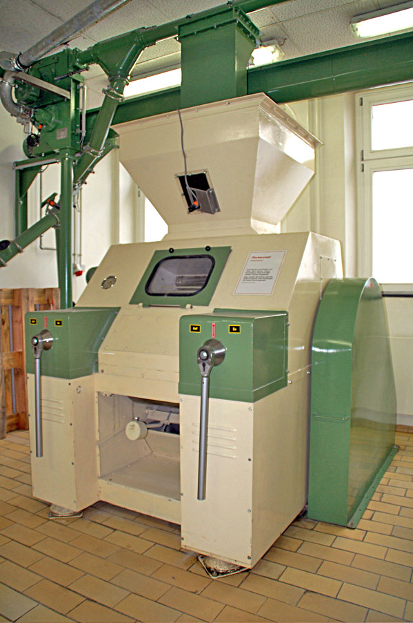 Flockierstuhl oder Flockenstuhl. Mit ihm werden Haferflocken o.ä. gewalzt